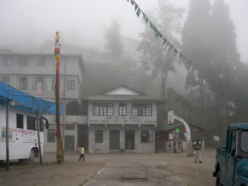 Tibetan Refugee Self Help Centre, Darjeeling, India